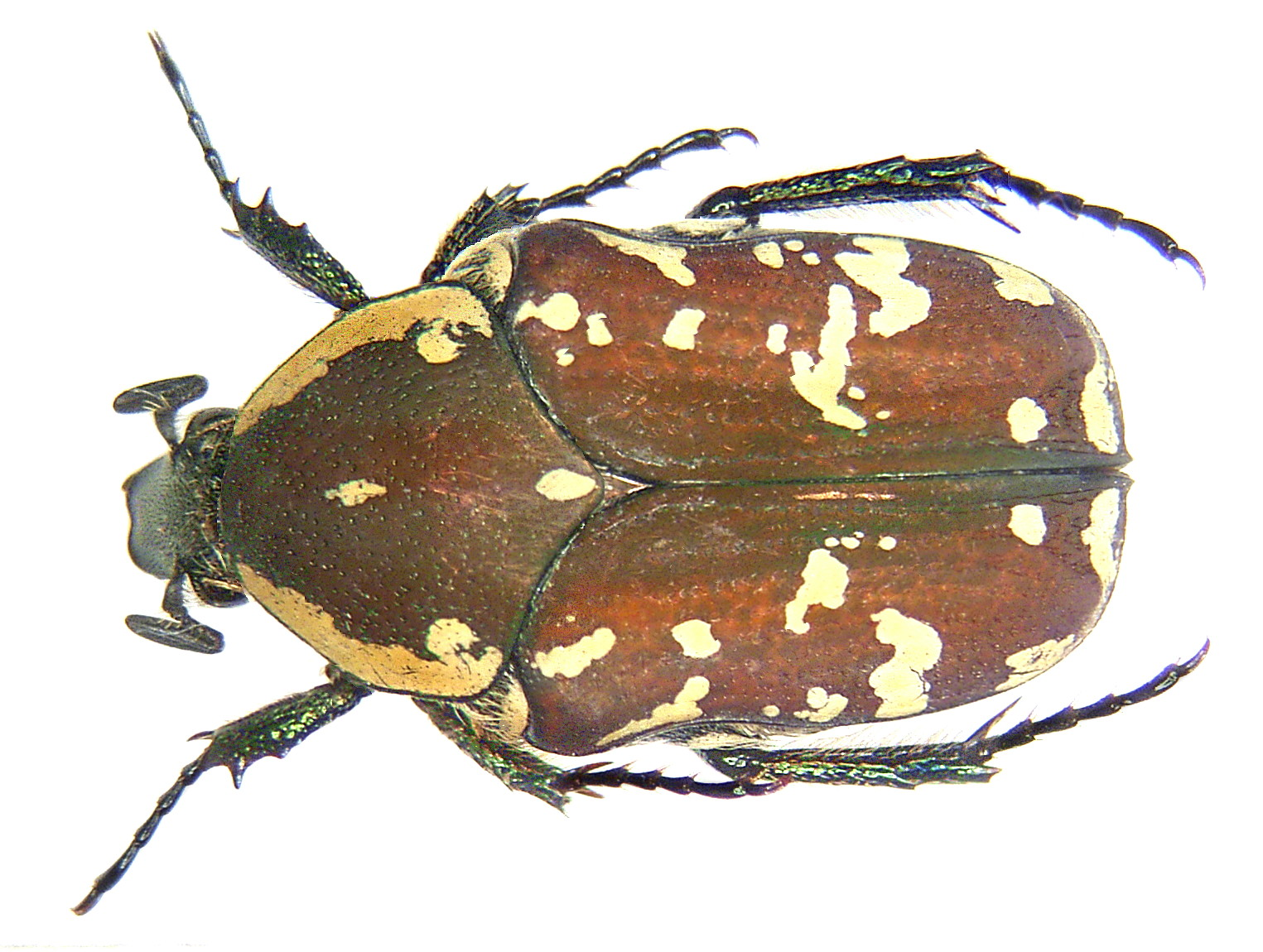 Familie: Scarabaeidae Grösse: 11,3-12 mm Fundort: Nepal, Annapurna, Andruck-Birethanti leg. A.Skale, 2000; det. U.Schmidt Foto: U.Schmidt, 2006